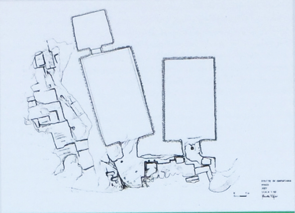 Pianta della grotta di Caratabia